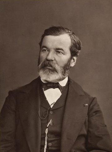 Portrait de Jean Marie Bonnassieux, sculpteur lyonnais